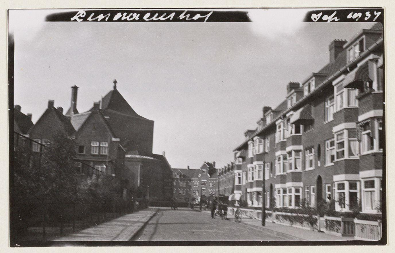 Beschrijving Linnaeushof 17-40 Links nummers 99-100, gezien op de achtergond naar RK-Kerk "Heilige Martelaren van Gorkum" Documenttype foto Vervaardiger Eck, J. van (Jacobus, 1873-1946) Collectie Collectie J. van Eck: foto's Datering september 1937 Geografische naam Linnaeushof Inventarissen Afbeeldingsbestand A01634001183 Generated with Dememorixer